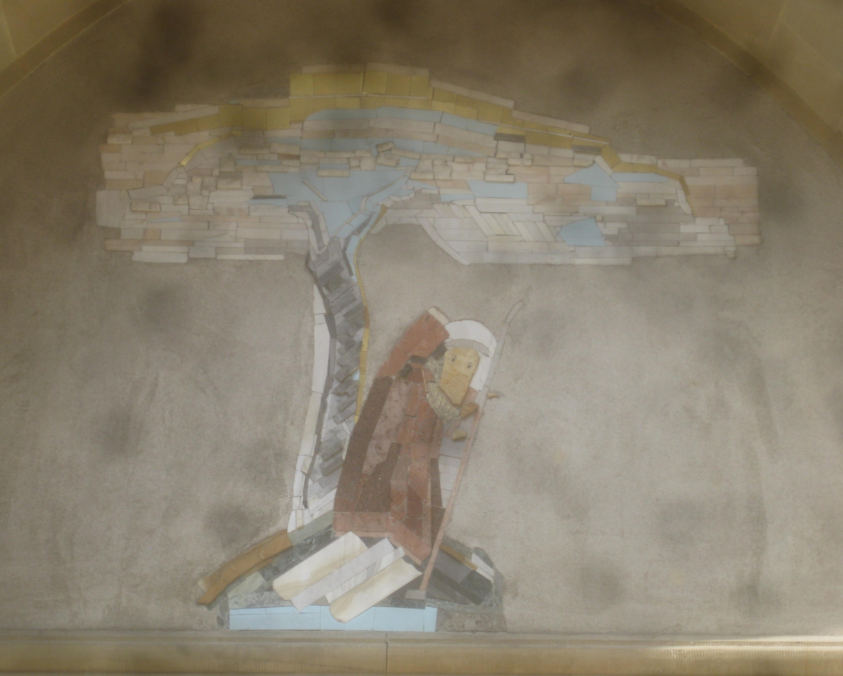 Mosaik im Bogenfeld des Hauptportals der katholischen St. Fideliskirche in Stuttgart.